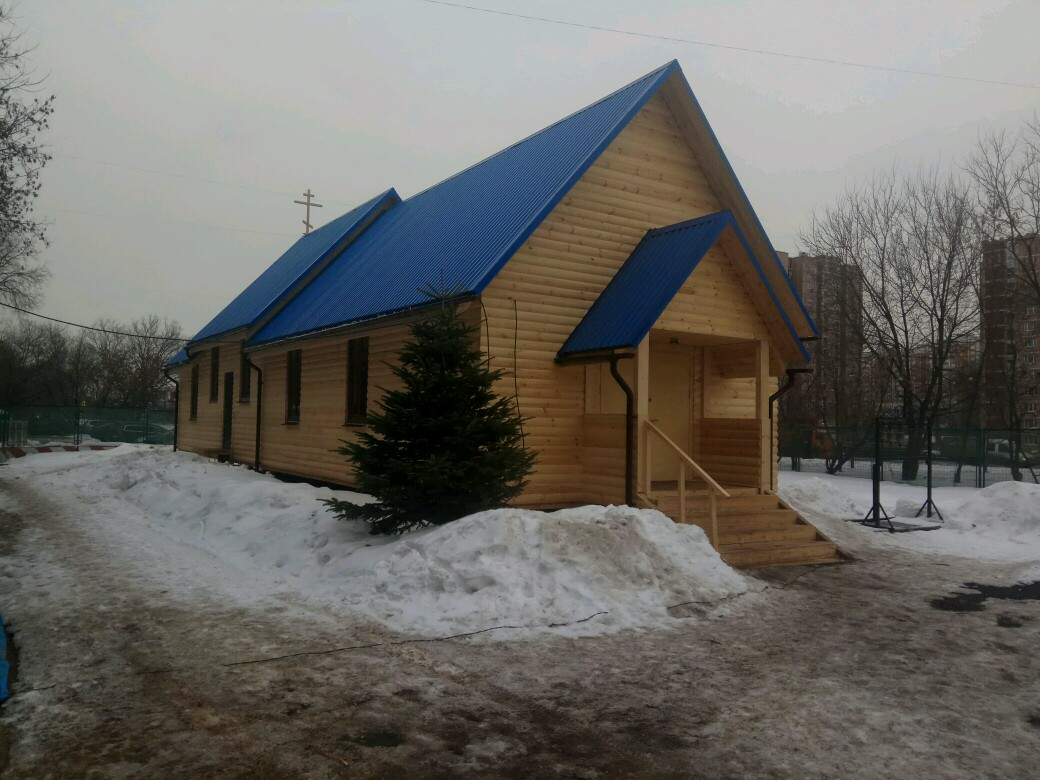 Успенский храм. Подворье Иосиофо-Волоцкого монастыря. Мневники ул., влад. 10